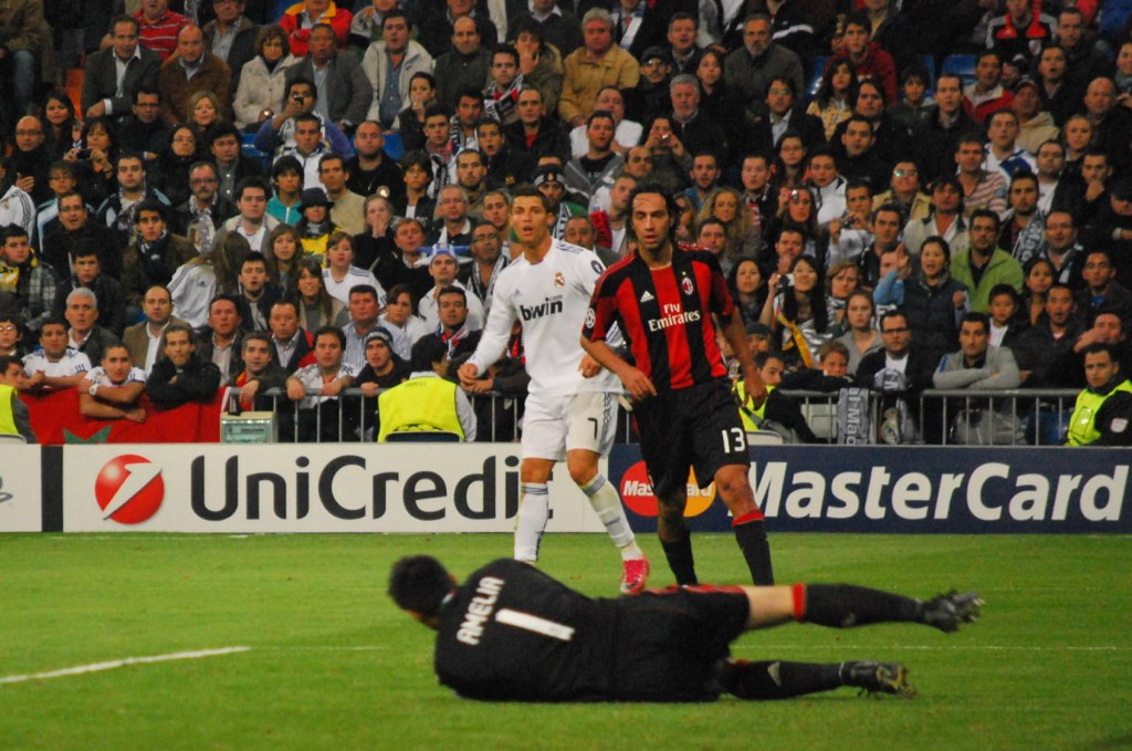 Paro el portero